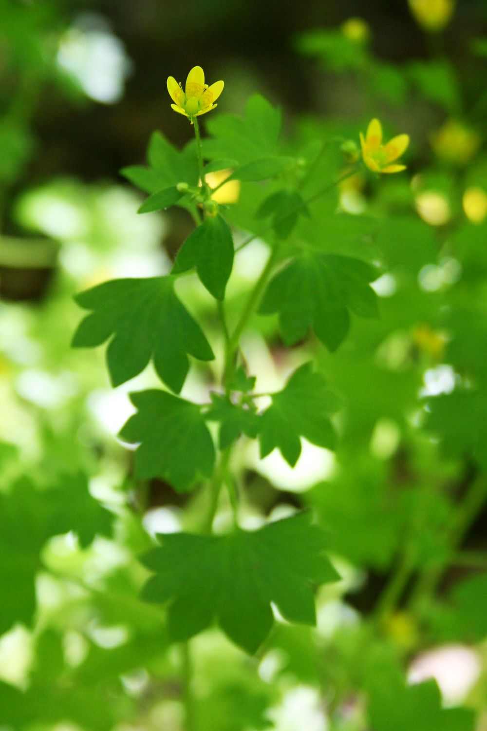 Saxifraga cymbalaria var. cymbalaria, Steinbrechgewächse (Saxifragaceae) - Türkei/Türkiye/Turkey: Prov. Bolu/Bolu ili, Bolu Dağları, Yedigöller-Nationalpark/Yedigöller Millî Parkı, Sazlıgöl